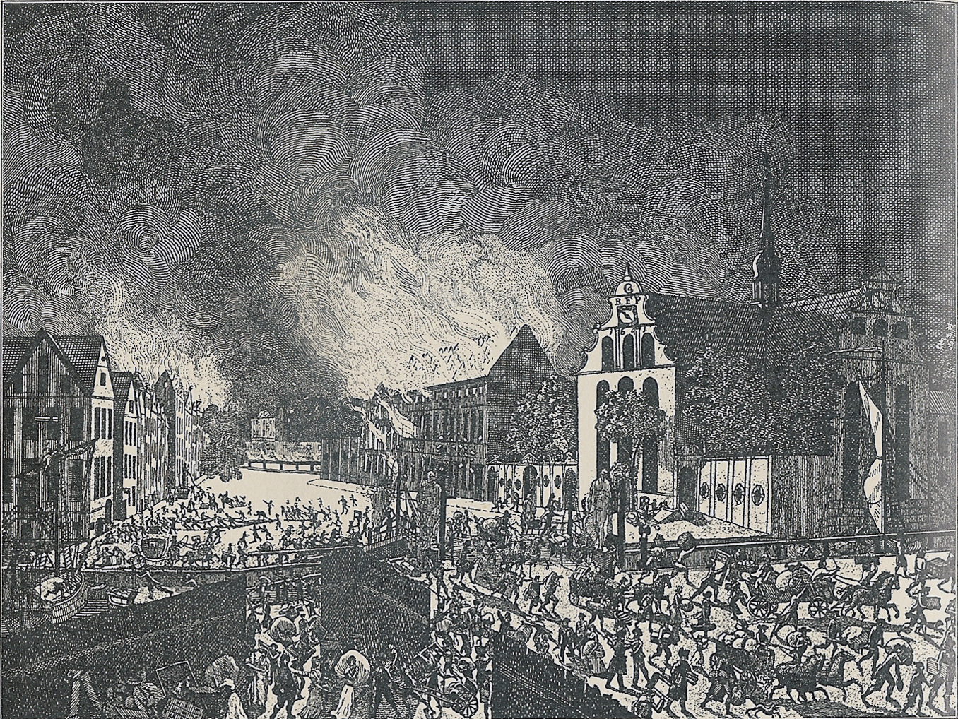 Begyndelsen på Københavns Brand 5. juni 1795. Efter stik af Lahde.